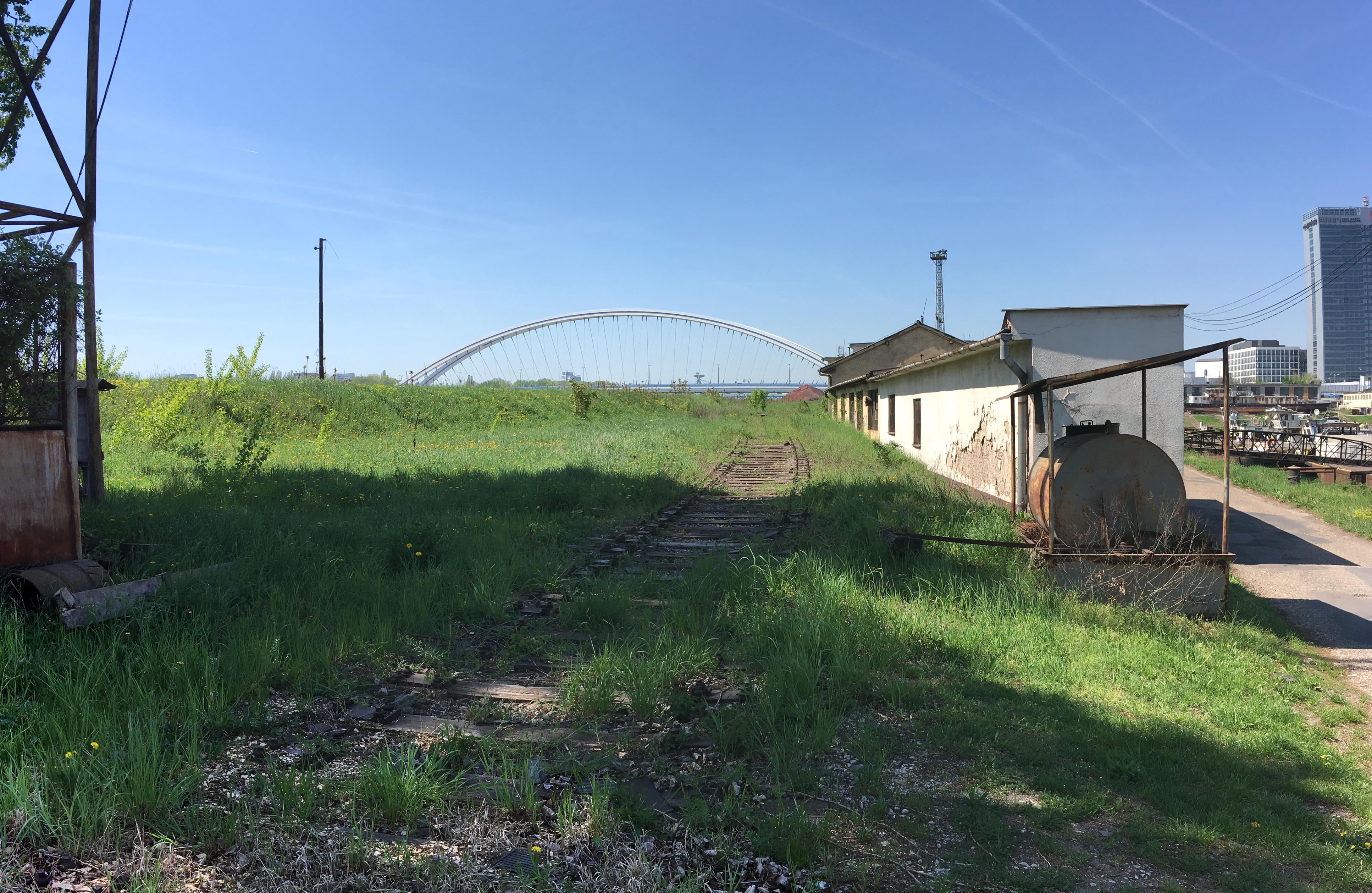 trasa pôvodnej železničnej vlečky v tzv. Zimnom prístave v Bratislave